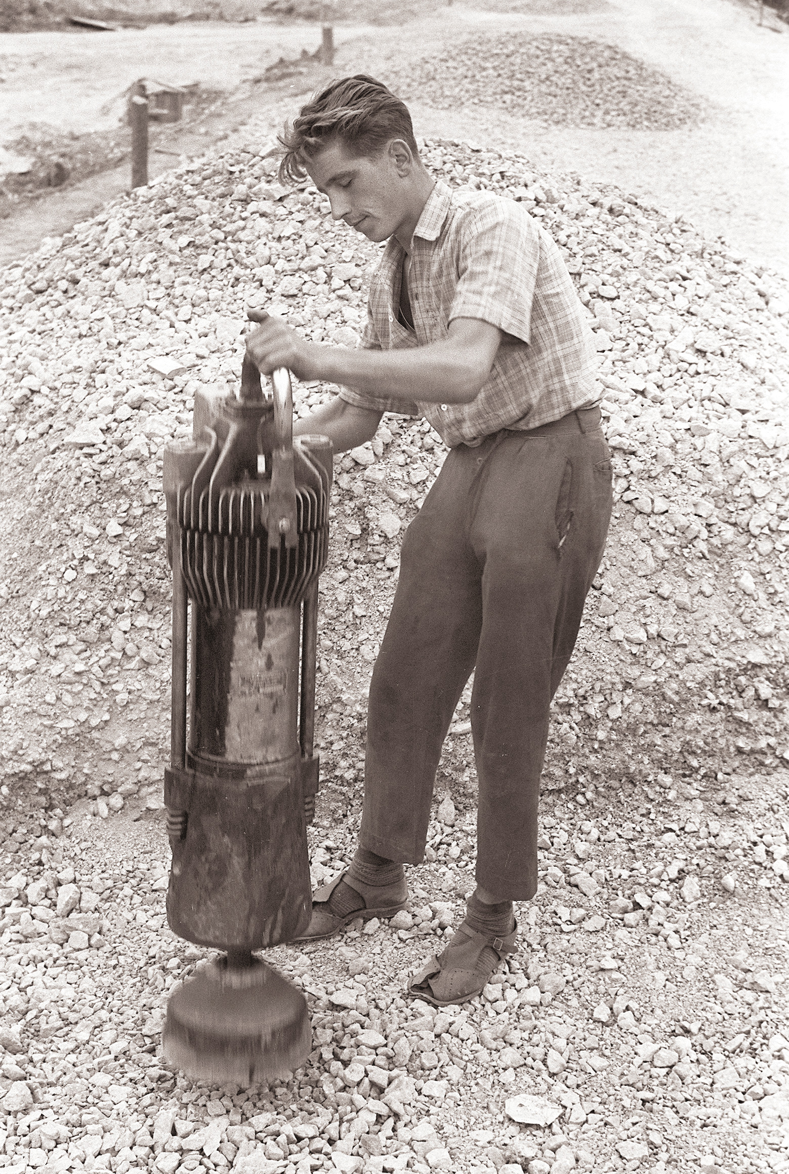 Gradnja asfaltirane ceste čez Trojane.